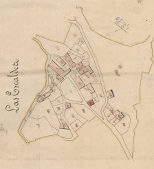 Les Escaldes, a Angostrina i Vilanova de les Escaldes en el Cadastre Napoleònic del 1812 (Arxius Departaentals dels Pirineus Orientals)